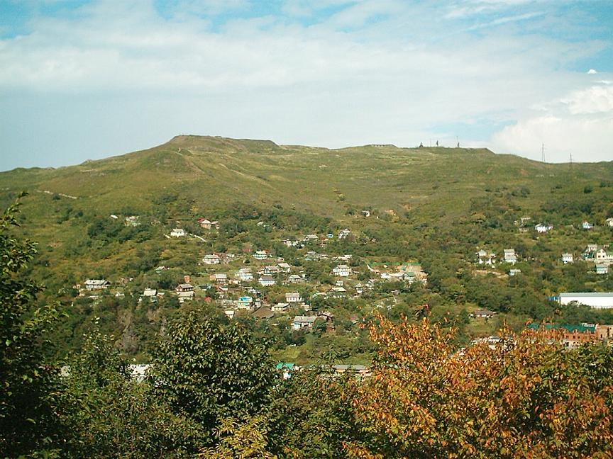 Mount Holodilnik (Vladivostok)